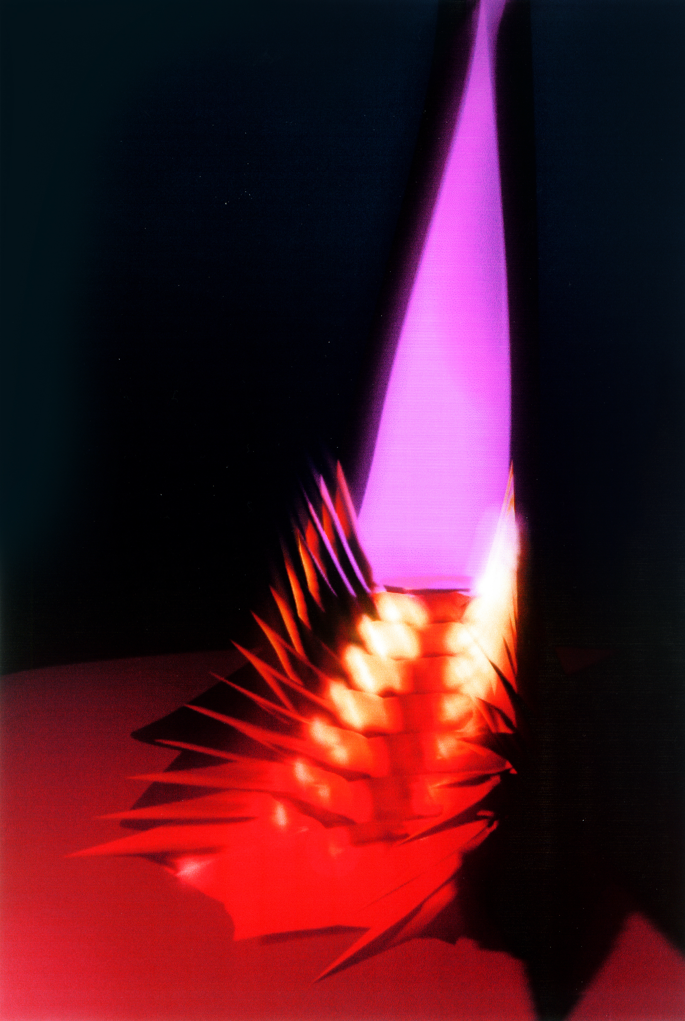 Сценография спектакля "Норма"